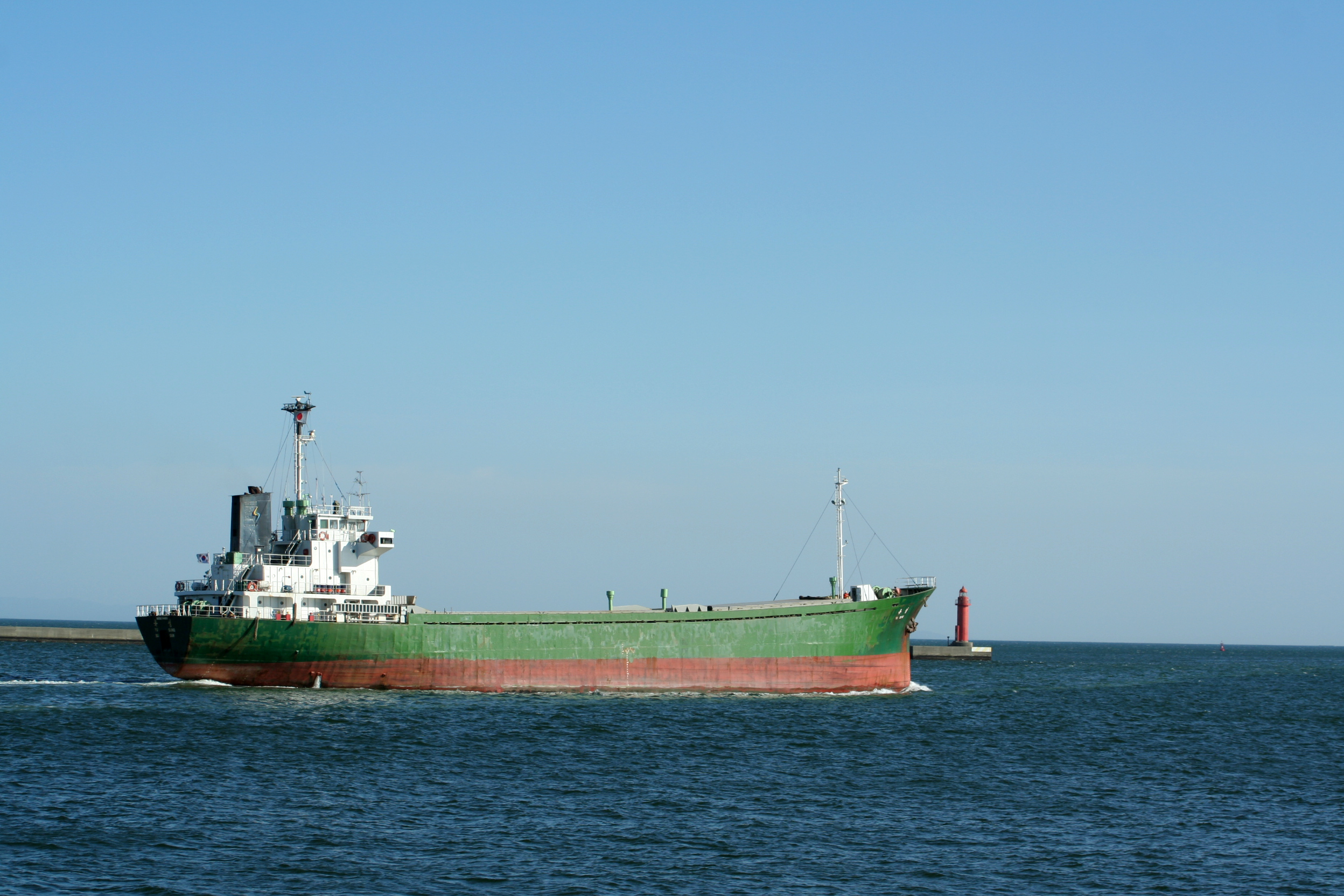 姫路港から出港する輸送船Yu Sung。